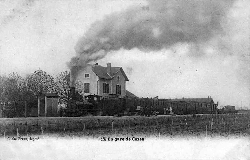 Train devant la gare de Cozes sur la ligne de Pons à Saujou.